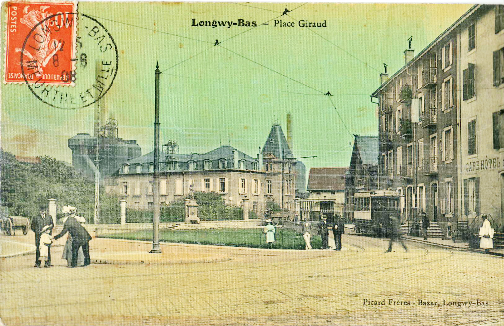 Carte postale ancienne éditée par Picard-Frères, bazar à Longwy-bas : LONGWY-BAS - Place Giraud